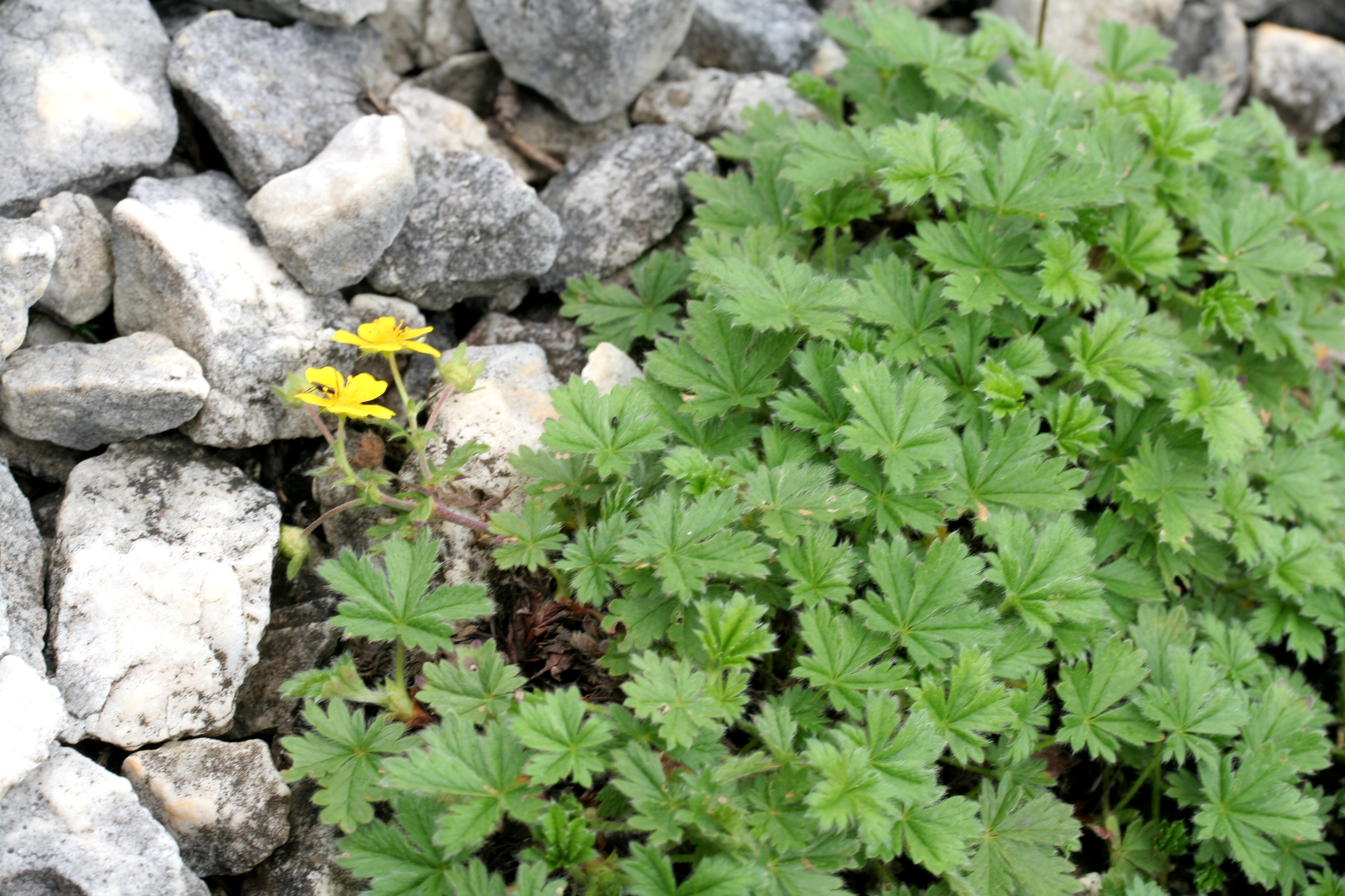 Potentilla_crantzii (Cinquefoglia di Crantz) Giardino Botanico Alpino "Giangio Lorenzoni" (loc. Pian Cansiglio), Tambre d'Alpago (BL), quota 1000 m s.l.m.